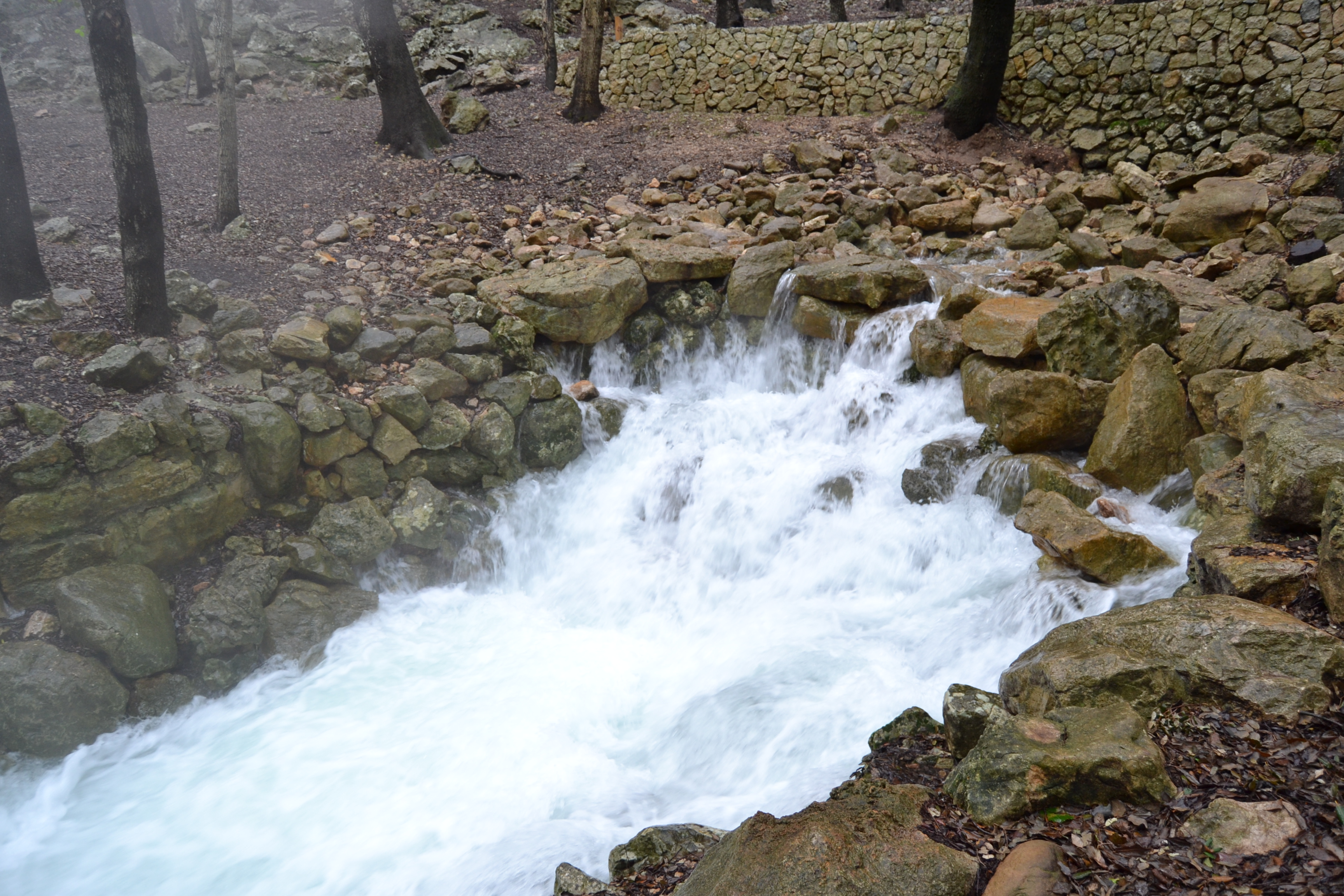 Fonts Ufanes, Campanet, Mallorca This is a a photo of a natural area in the Balearic Islands, Spain, with id: ES530080